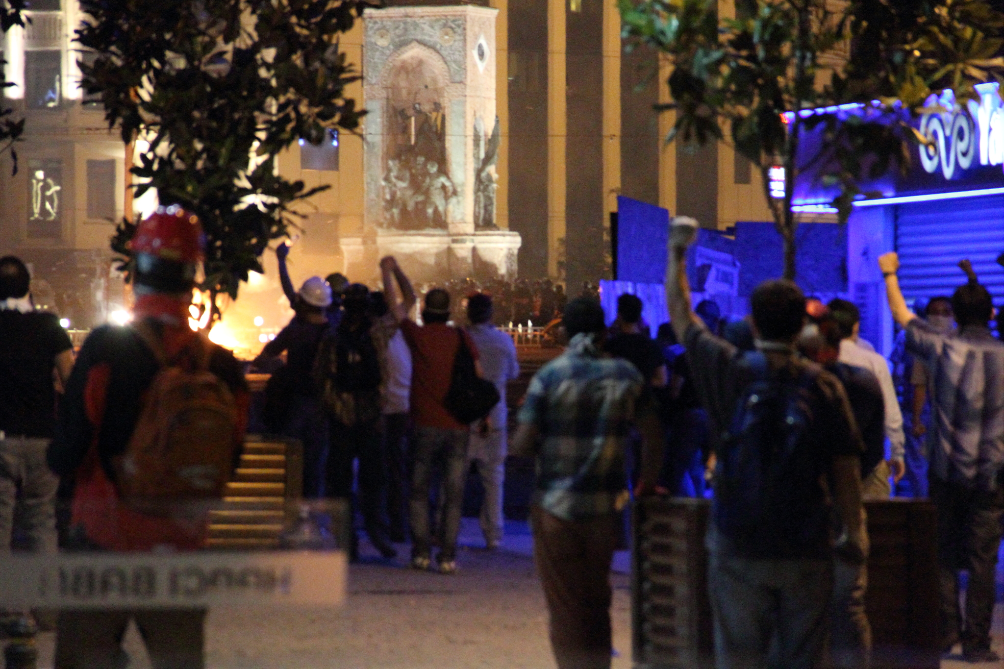 Gezi Parkı Müdahale